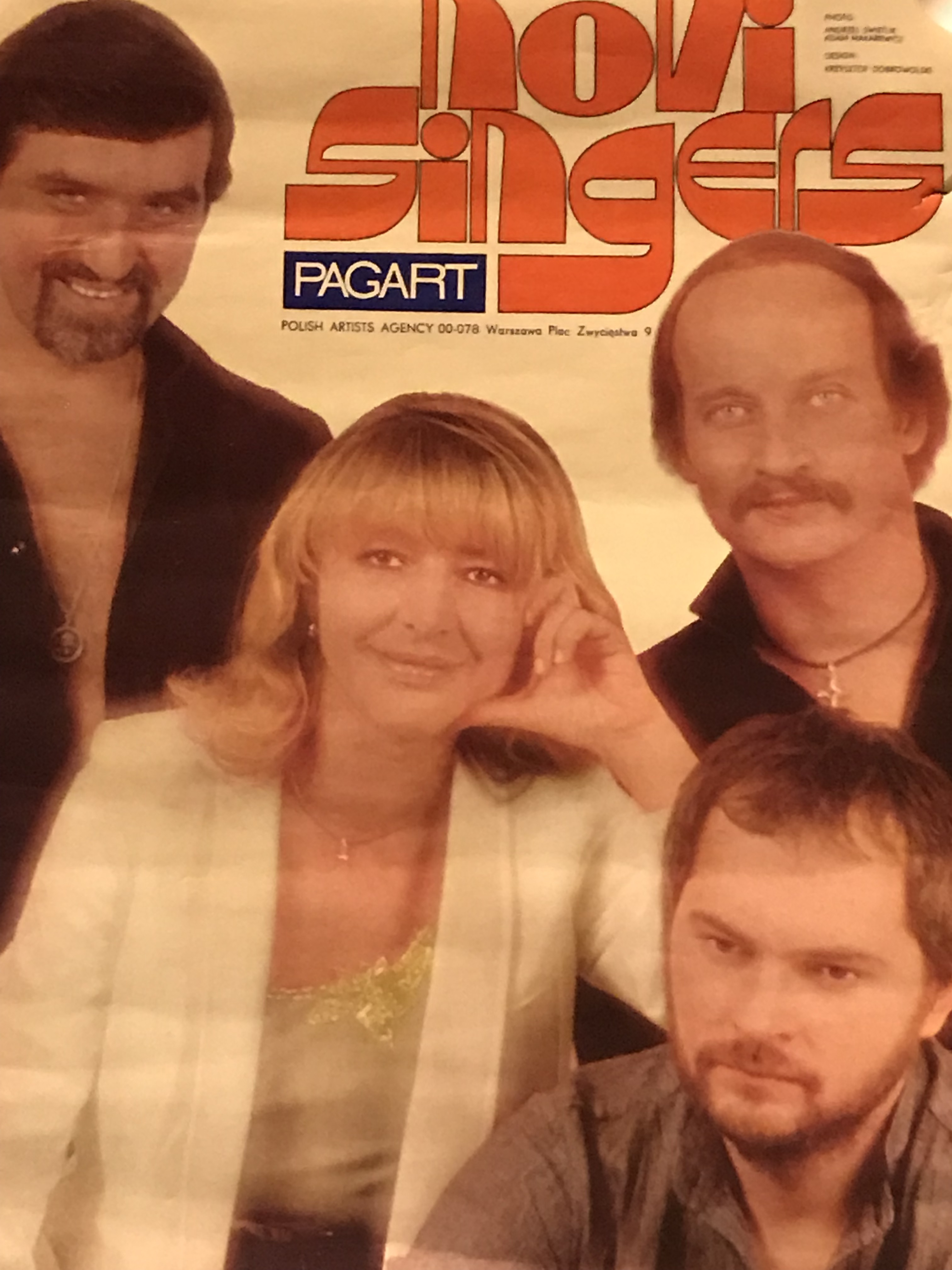 Plakat koncertowy kwartetu wokalnego Novi Singers Pagart 1976 lub 1977.